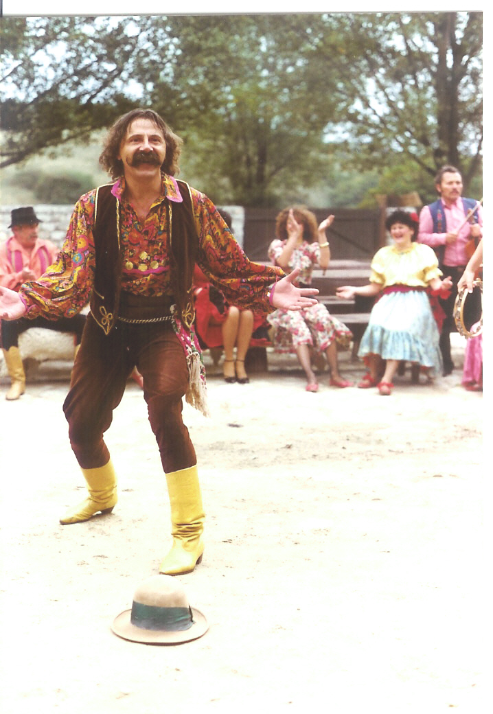 Pusztaartist